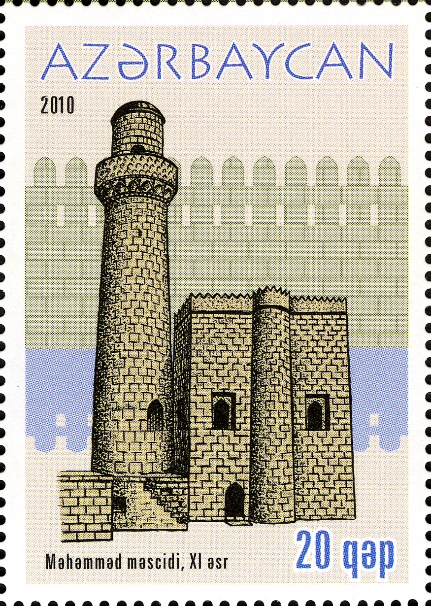 İçəri şəhər